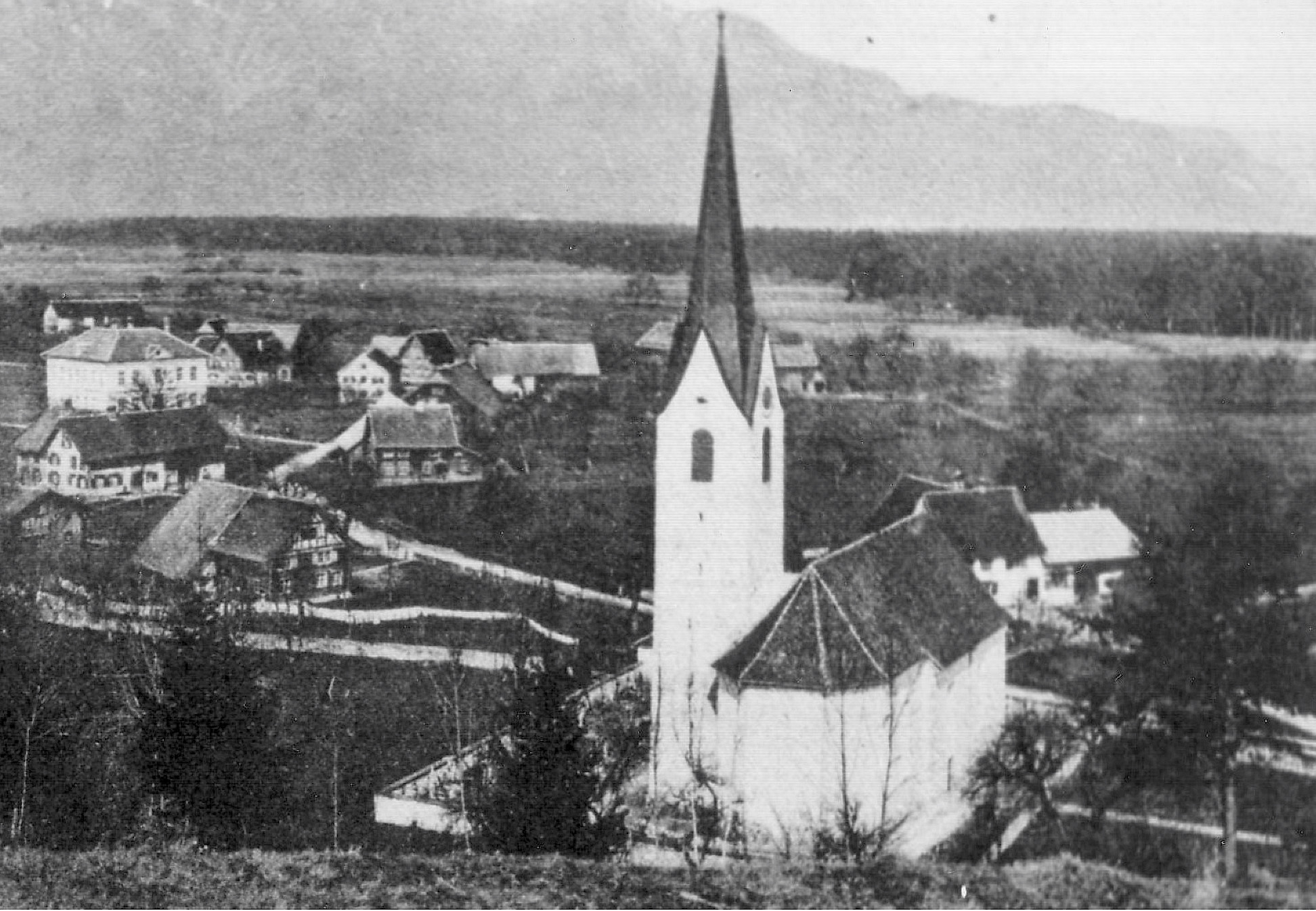 Nofels, Postkarte, Ansicht um 1900